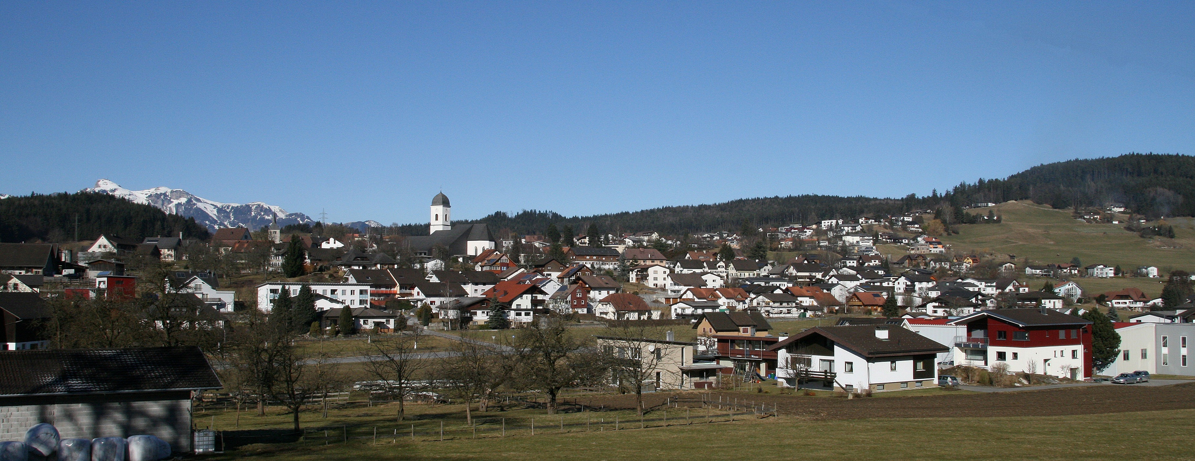 Ortsteil von Göfis bei Feldkirch in Vorarlberg.